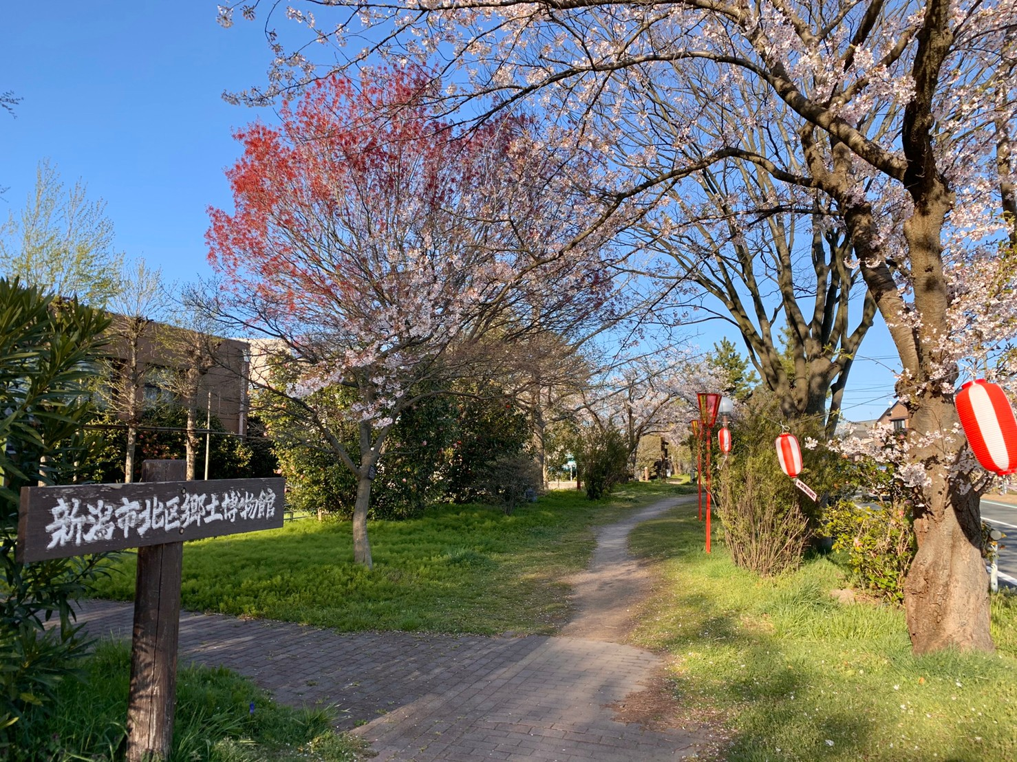 新潟市北区郷土博物館と葛塚東部緑道（2020年4月）